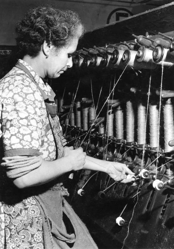 2.11.1953 Vereinigte Jute-Spinnereien und Webereien A.G., Hamburg, Werk Beuel Copsmaschine: Umspulen von Spinnspulen auf Cops Information added by Wikimedia users.